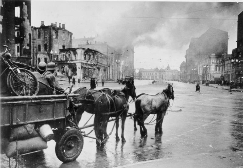 Scherl: Als die deutschen Truppen in die Stadt Charkow einzogen, waren viele Wohn- und Industriebauten von Partisanen in Brand gesteckt worden. PK-Aufnahme: Kriegsberichter Herber 11.11.41 [Herausgabedatum] Information added by Wikimedia users. Харьков. Оккупированная фашистами площадь Розы Люксембург, 11 ноября 1941. Вид от Пролетарской площади в сторону Армянского переулка.